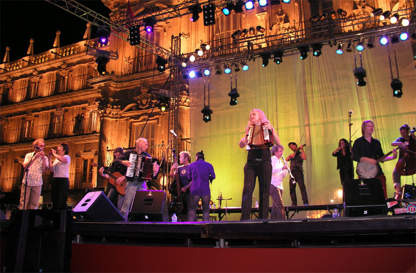 Imagen tomada durante el concierto en Salamanca, el 8 de septiembre de 2006